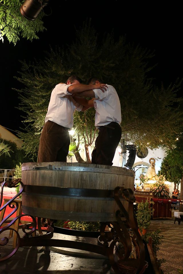 Vendimia Tradicional This is a photography of a Folklore festival in Spain (Wikidata id Q23662044).